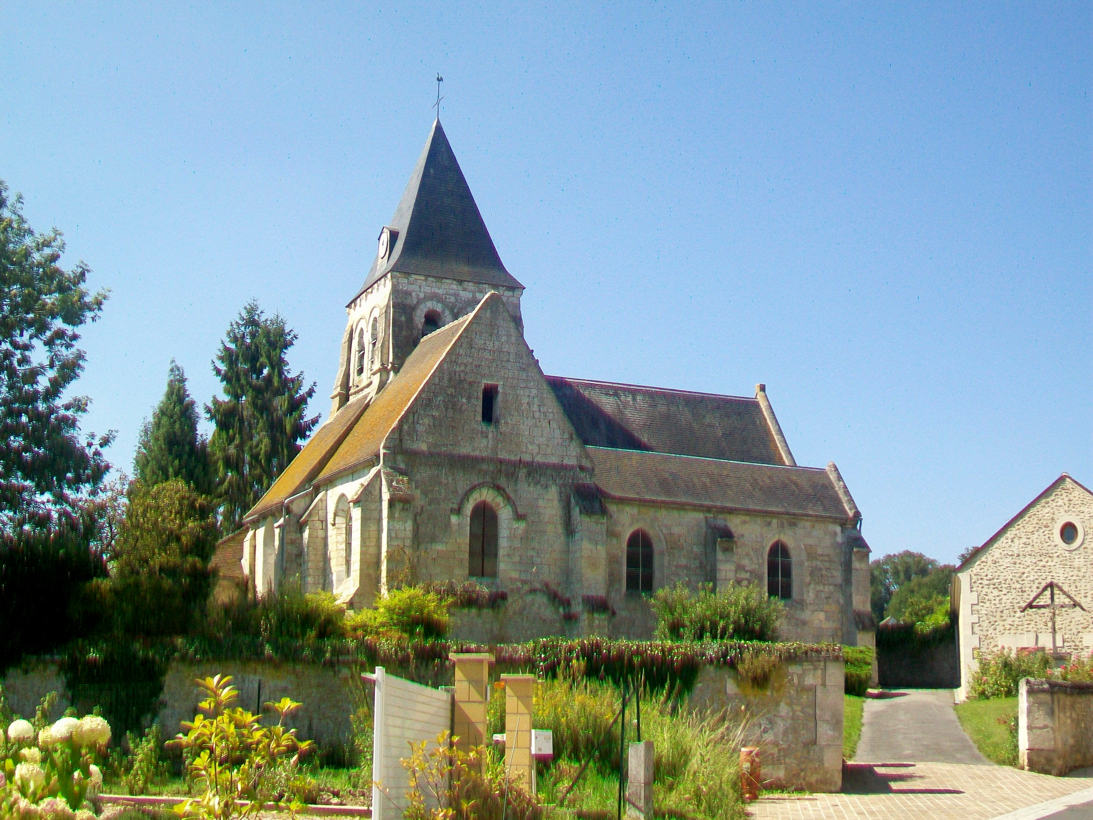 Vue sur l'église depuis le nord.